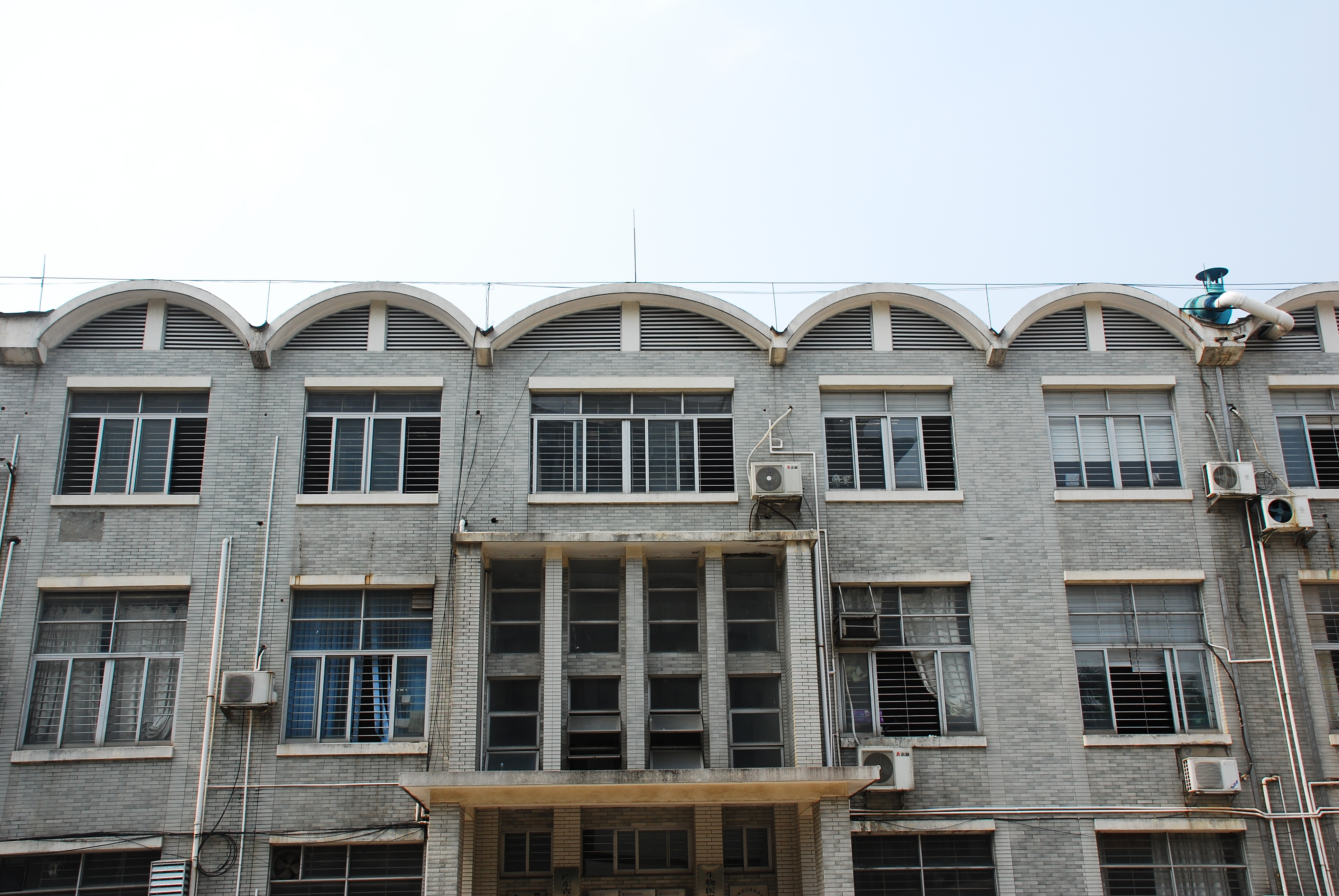 中文（中国大陆）: 华南工学院化工系楼旧址。位于广东省广州市天河区五山路381号华南理工大学。2014年公布为广州市历史建筑。